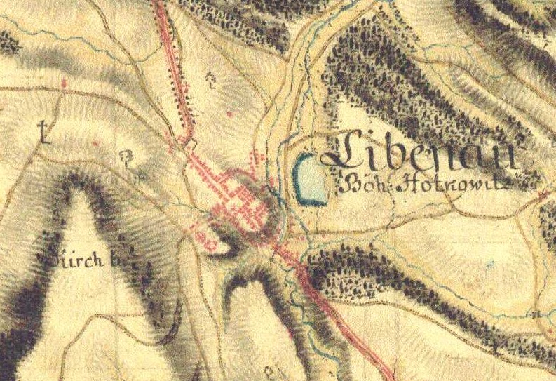 Hodkovice nad Mohelkou na prvním vojenském mapování, 1764.